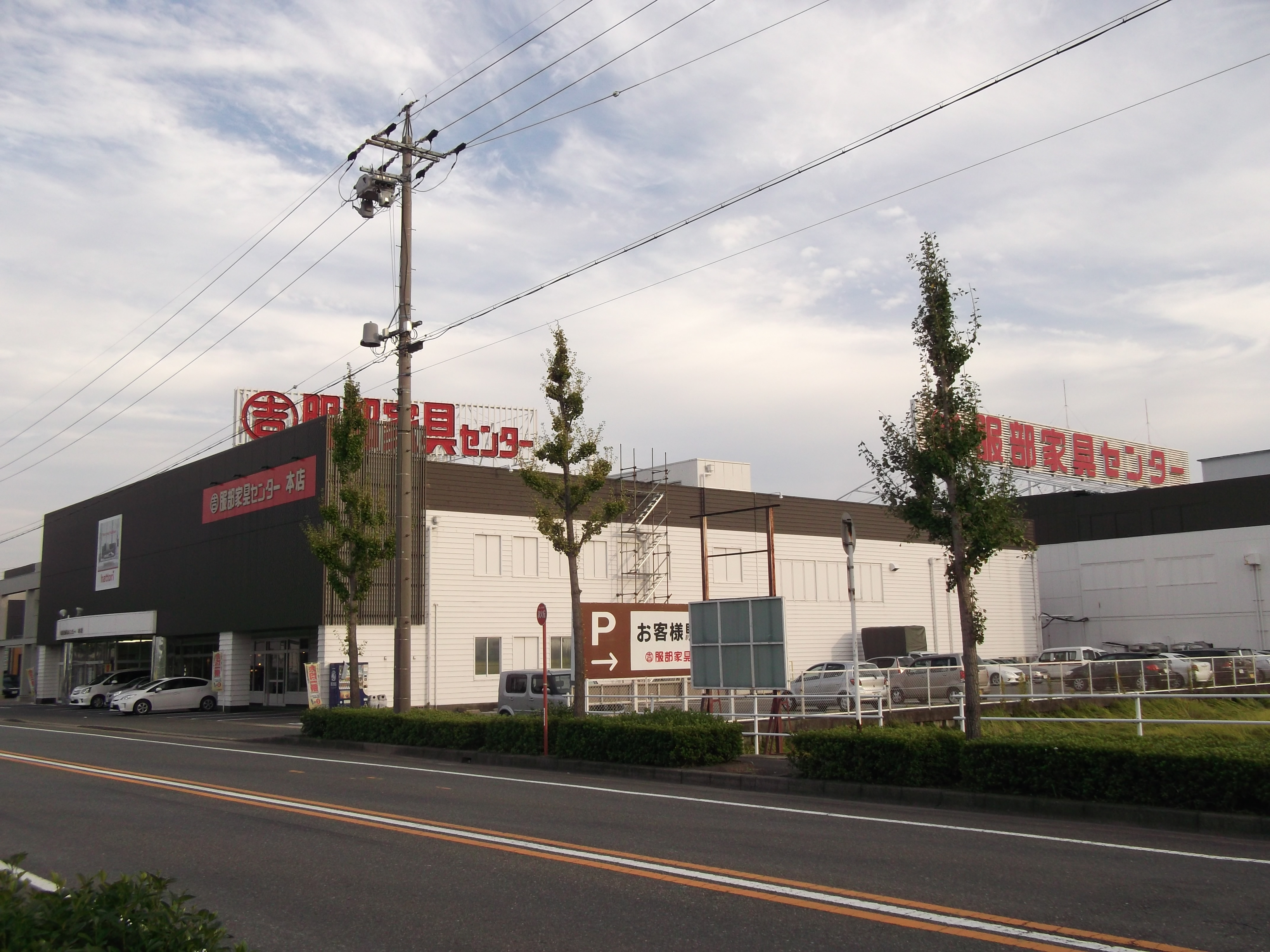 名古屋市港区六軒家の服部家具センター本店・本社を北側公道西側より撮影